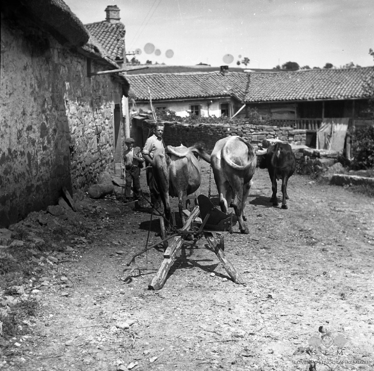 Na podori peljejo drvo domov, Misliče.